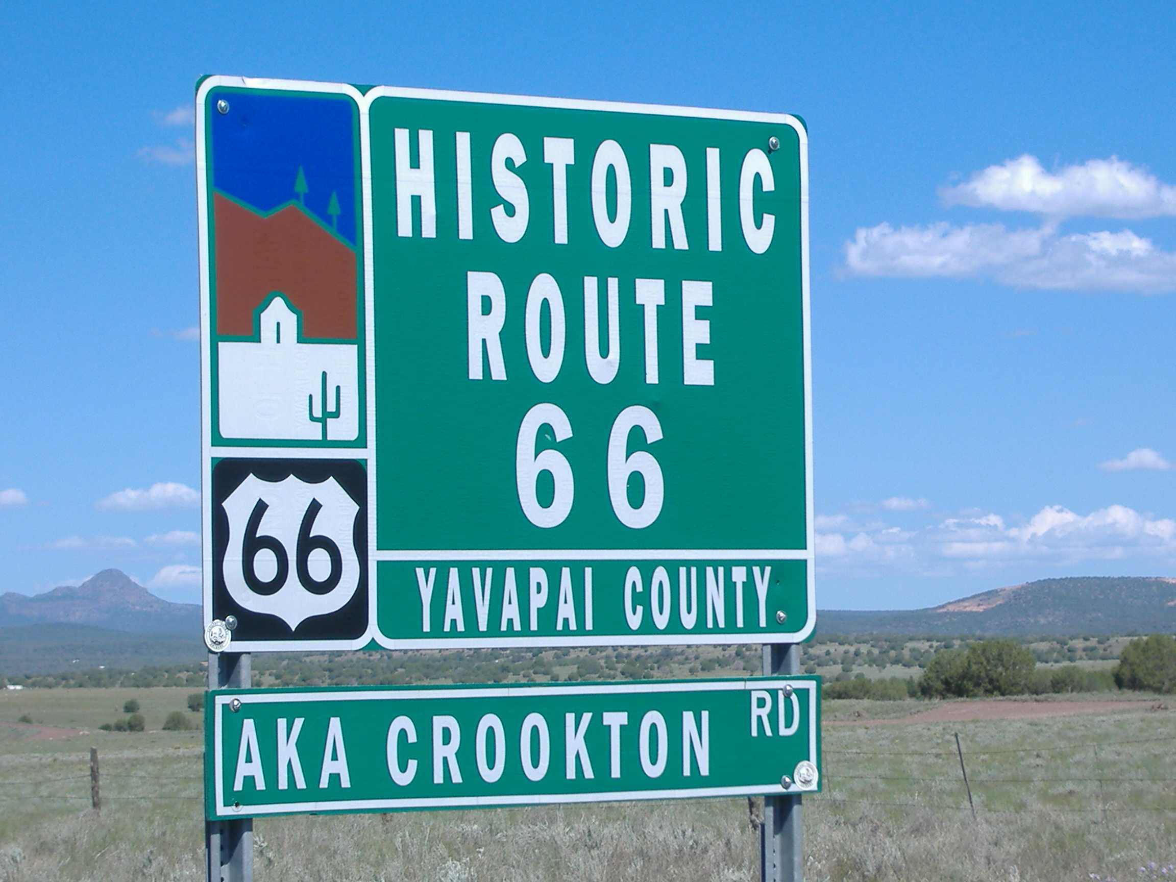 Road signal along Arizona Route 66